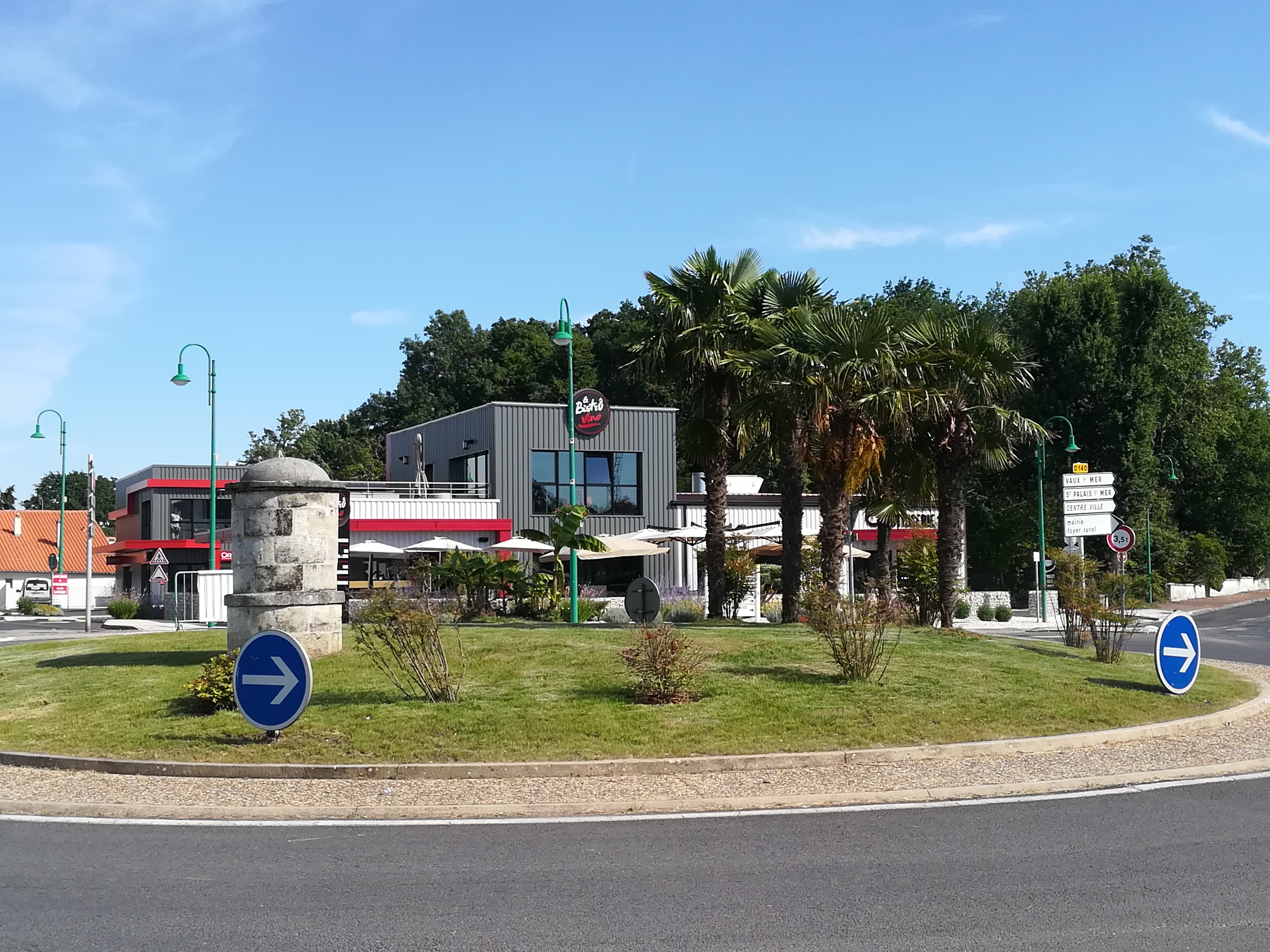 Rond-point du Magarin dans la zone d'activité du même nom à Breuillet (17)